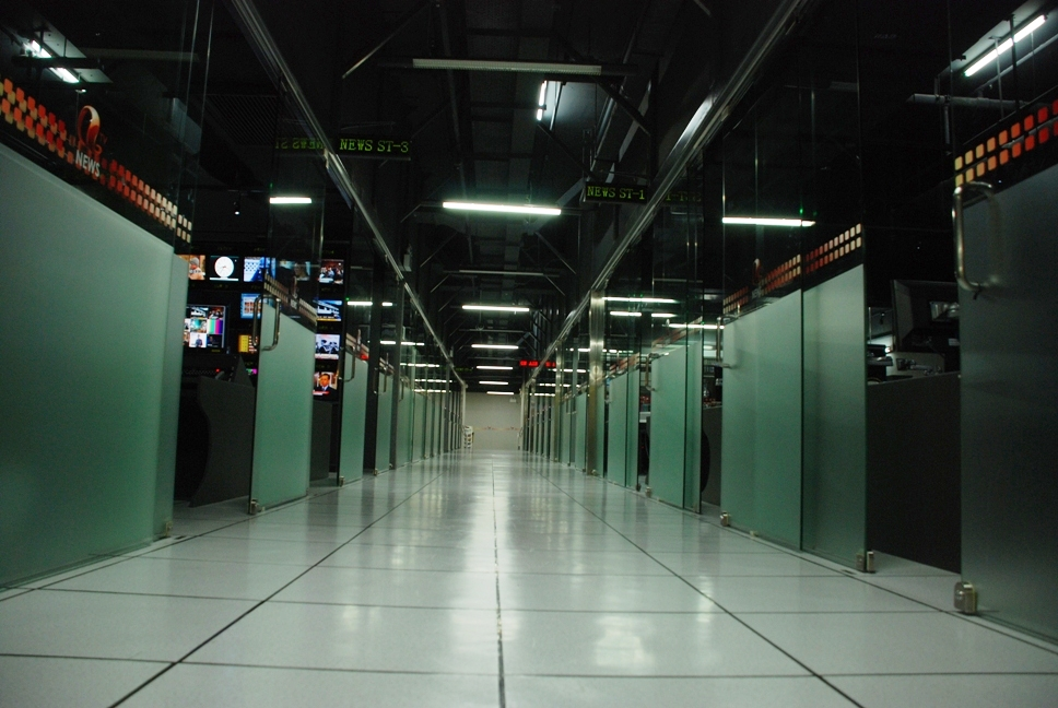 中文（香港）: 亞洲電視新聞部製作中心。